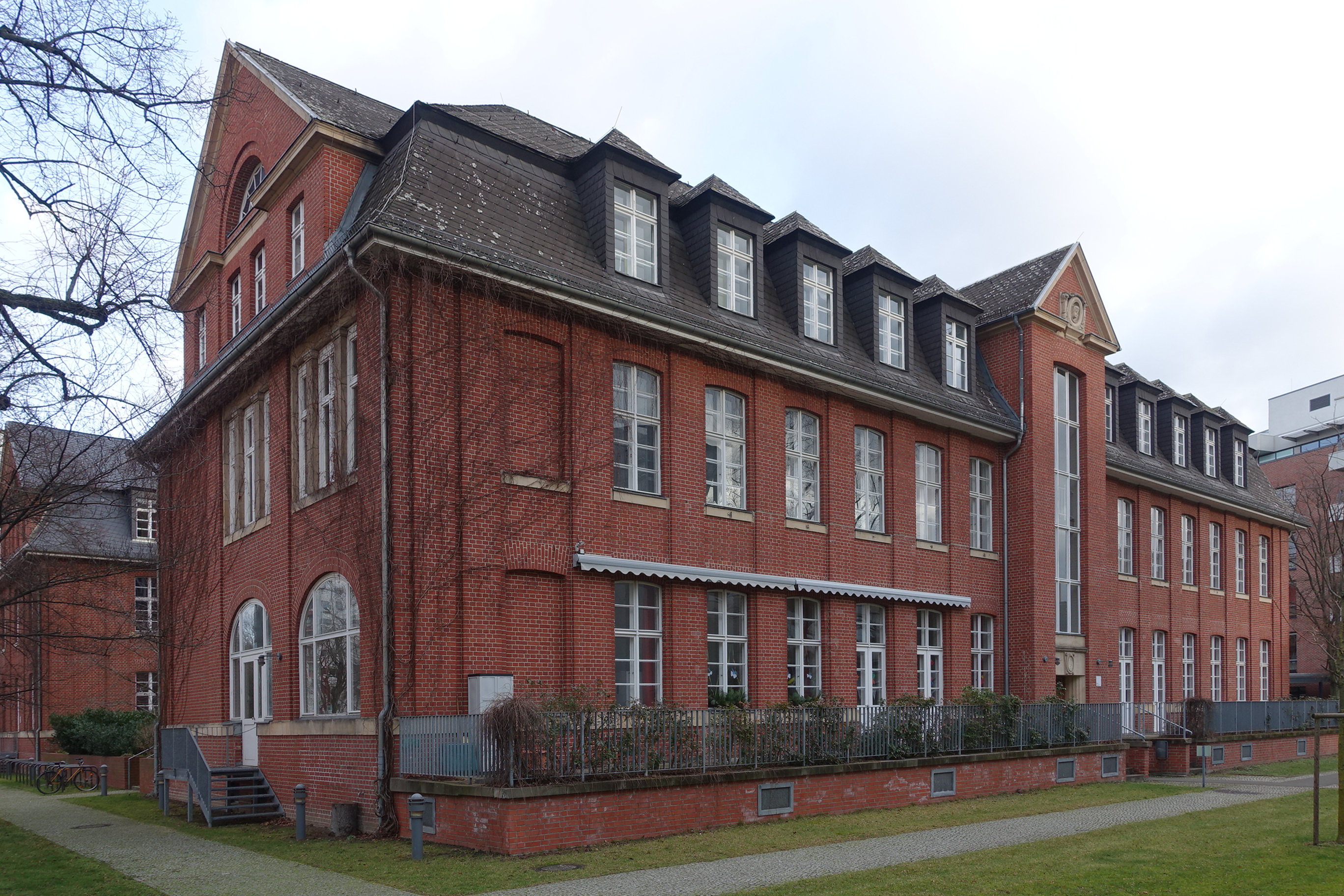 ehemaliger Krankenpavillon